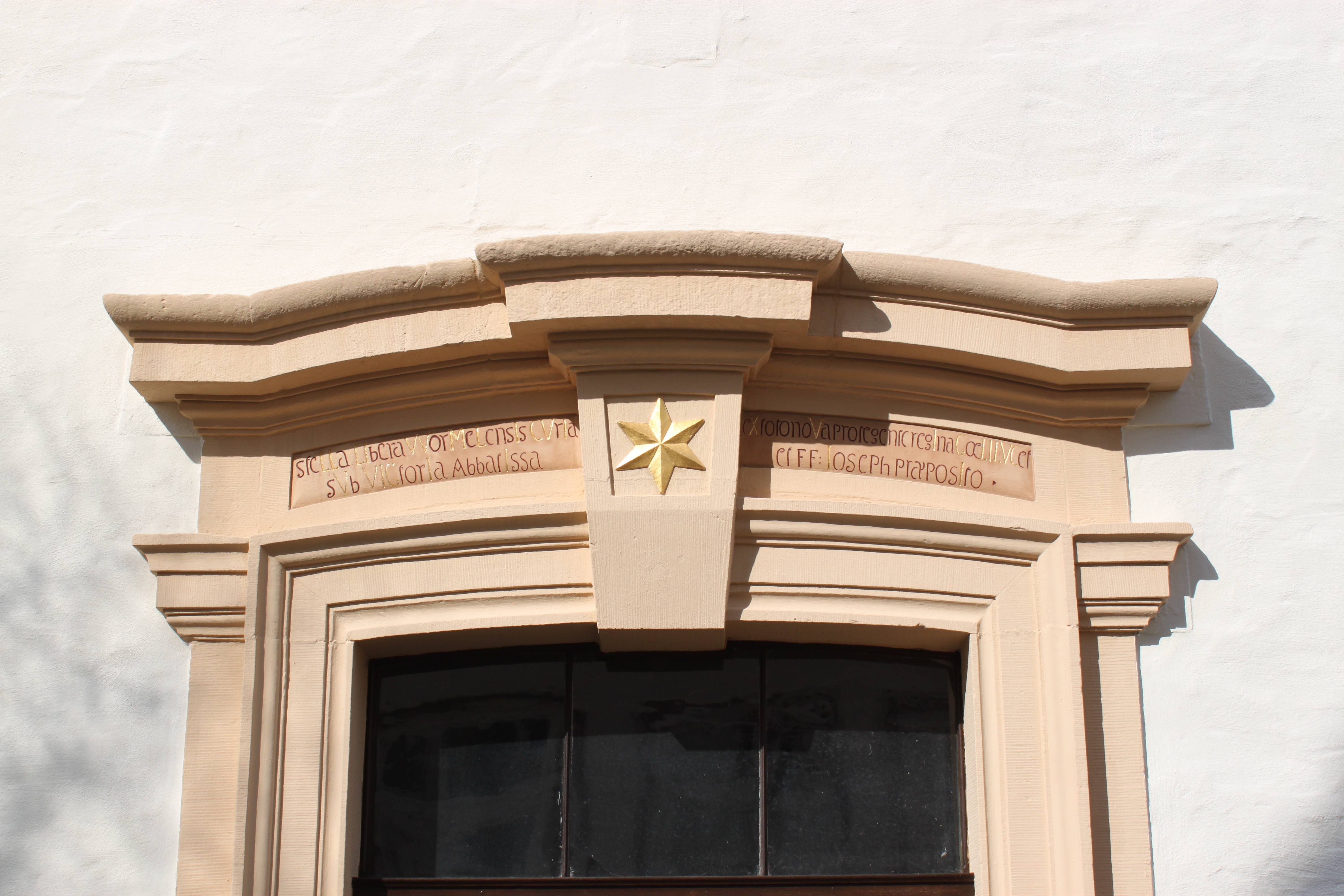 Barockportal des Hauses Zum Stern in Warburg